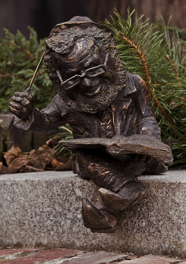 Krasnal Szomol upamiętniający Włodzimierza Szomańskiego (1948-2014) przed gmachem Filharmonii Wrocławskiej